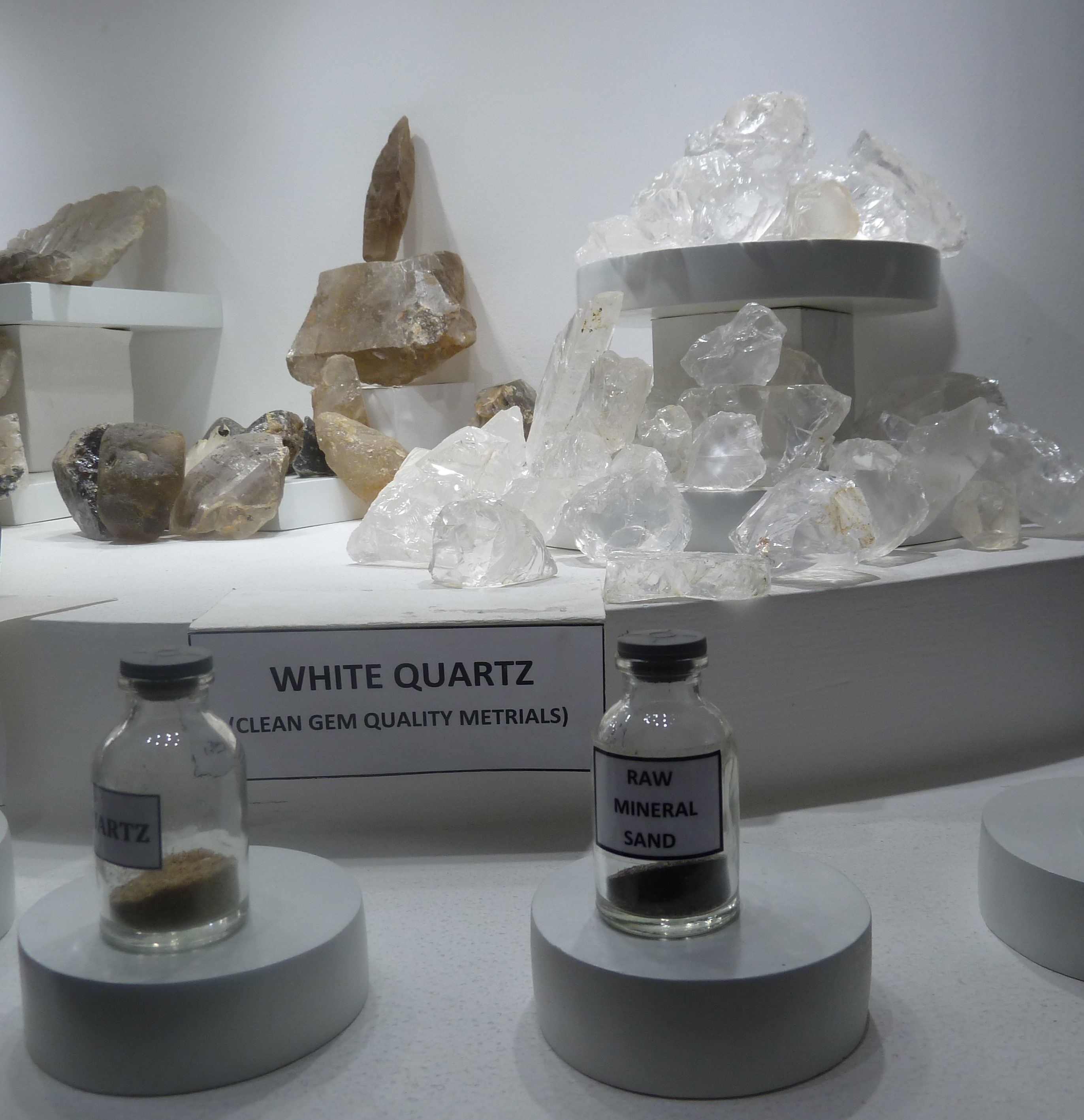 Isini Jewellerie à Kandy Sri Lanka.- Asie du Sud